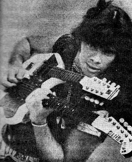 guitarrista brasileño pepeu gomes